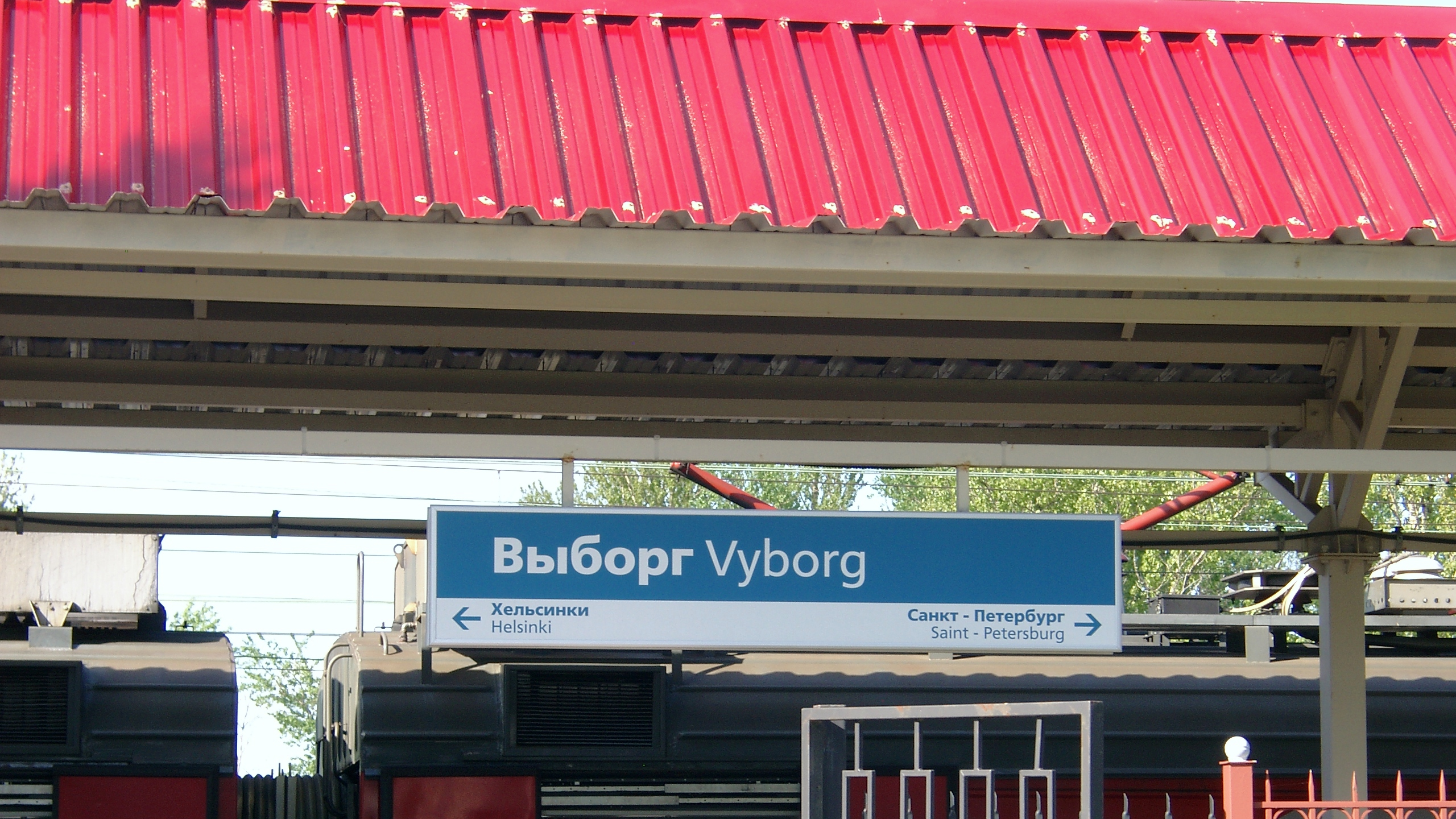 Станция Выборг, Ленинградская область, Россия. Указатель с названием на платформе.